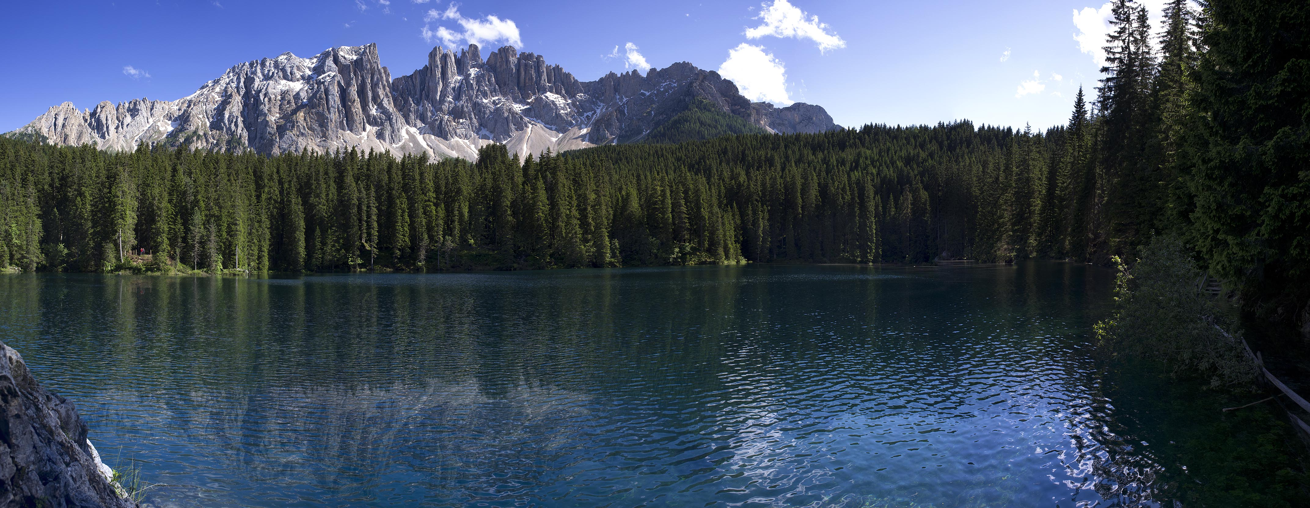 Panoramica del Lago di Carezza in Val d'Ega BZ con il gruppo del Latemar ©2013 francovisintainer